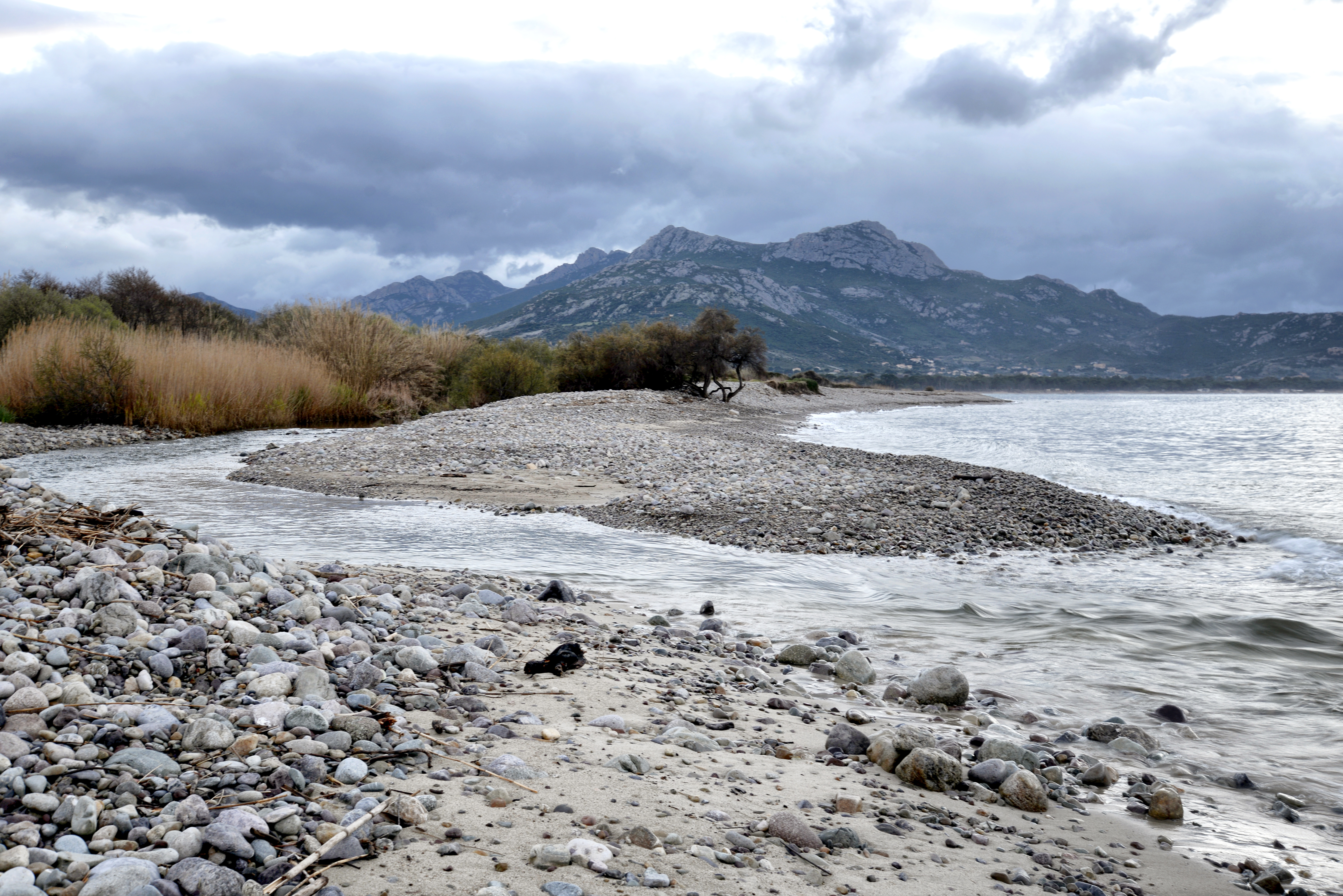 Lumio, Balagne (Corse) - Embouchure du fiume Seccu, entre plage de Calvi et plage Sainte-Restitude, dans le golfe de Calvi